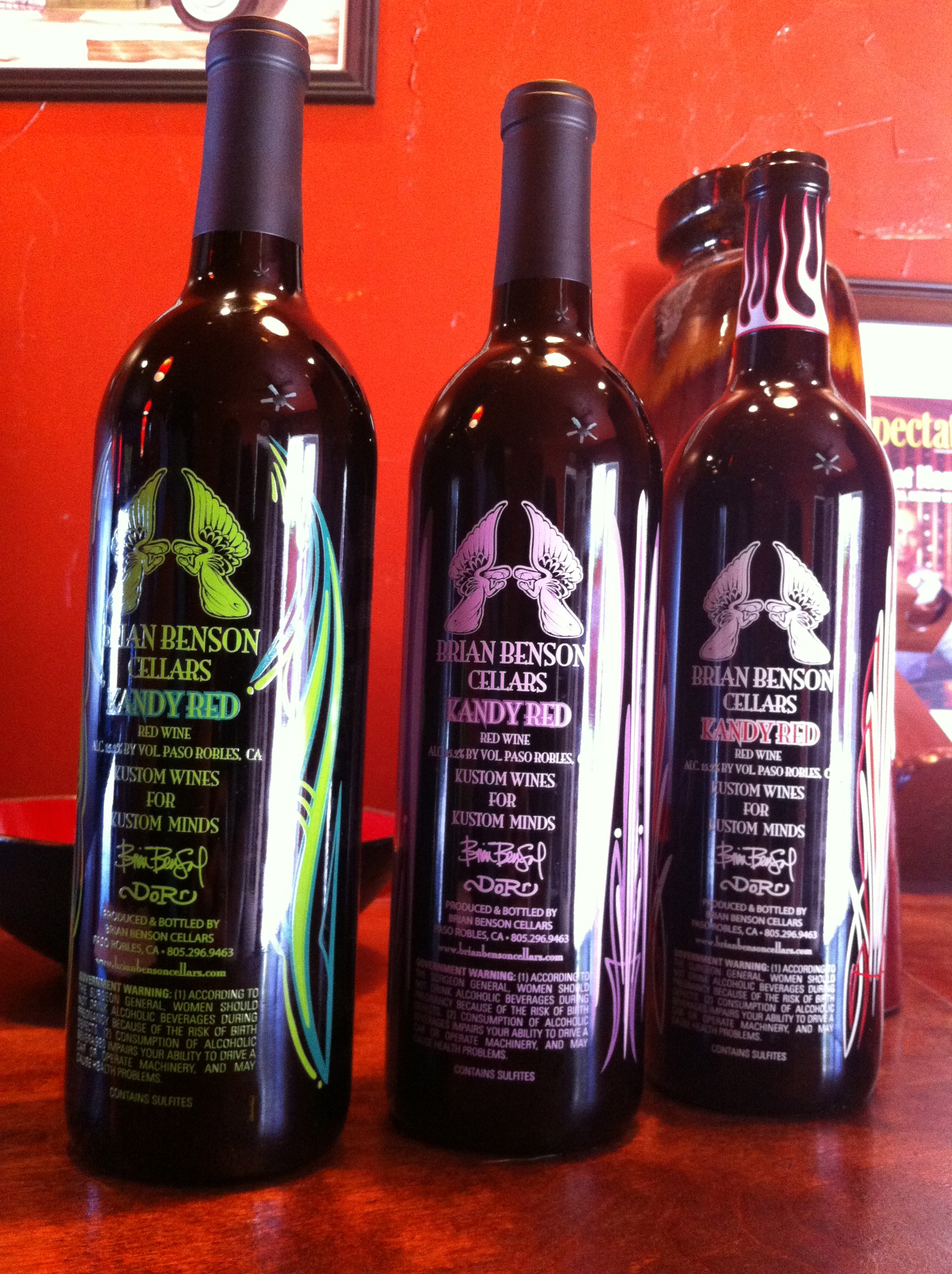 Bouteilles des Brian Benson Cellars